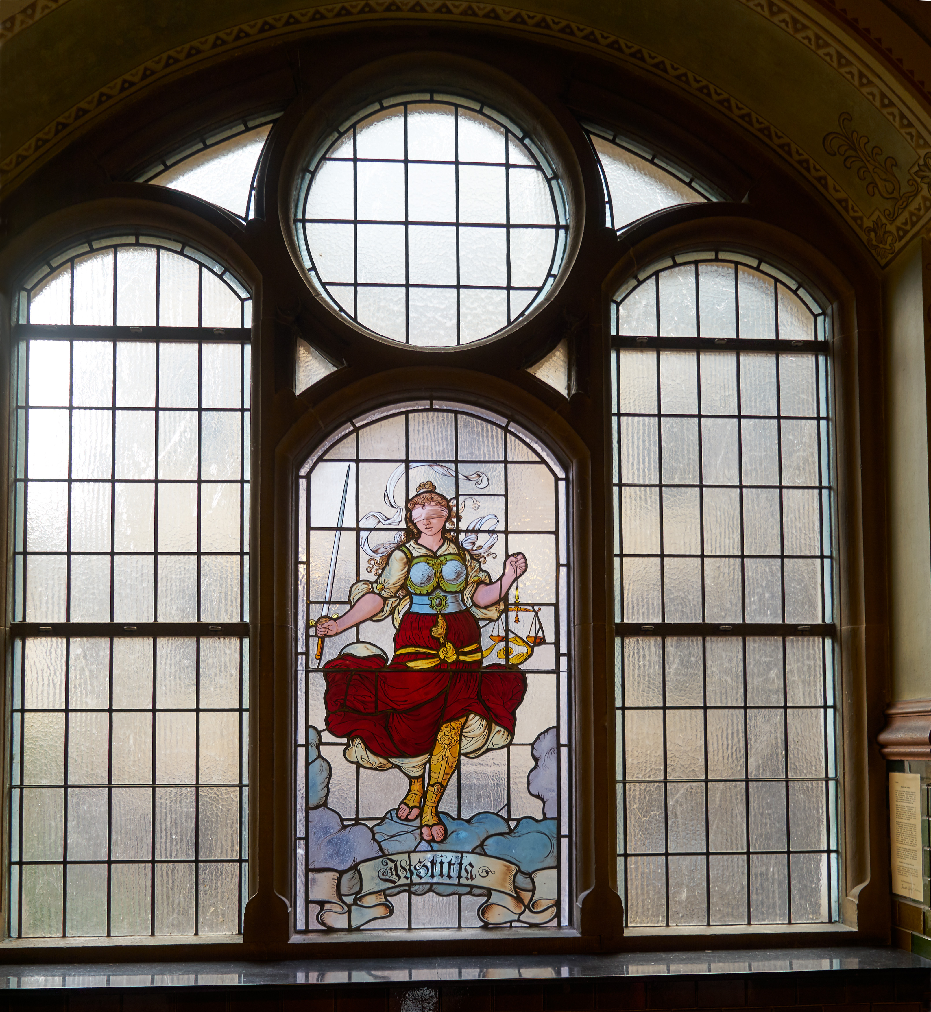 Gerichtsgebäude und Untersuchungsgefängnis in Bremen, Domsheide 16. Flurfenster mit Justitia.Das abgebildete Objekt ist ein geschütztes Kulturdenkmal in der Freien Hansestadt Bremen, mit der Nr. 0317 beim Landesamt für Denkmalpflege registriert.